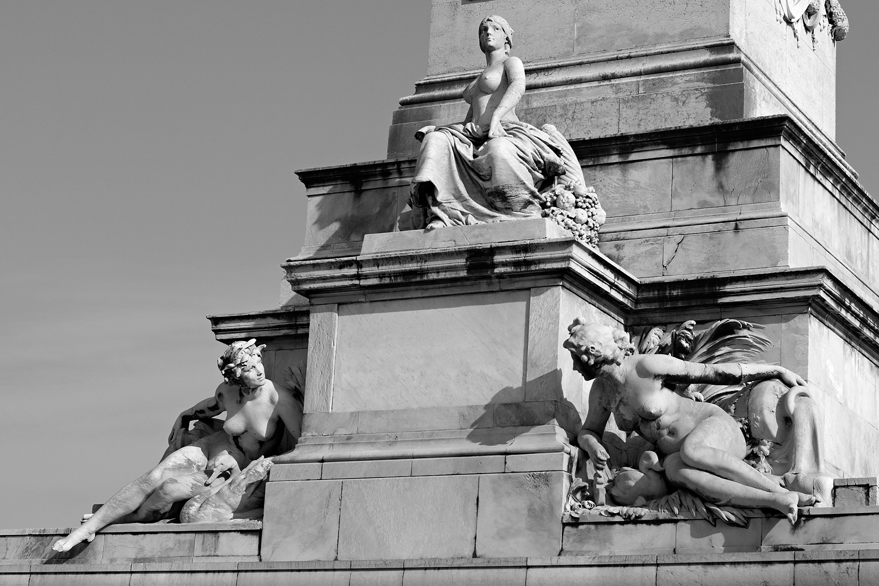 Monument aux Girondins, Bordeaux, France.